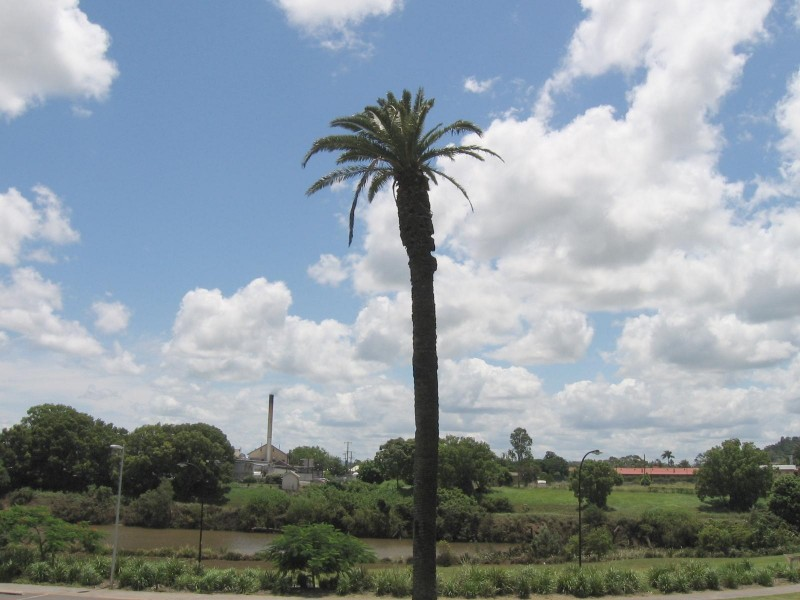 La rivière Wilson 0 Lismore, Nouvelle Galles du Sud Australie